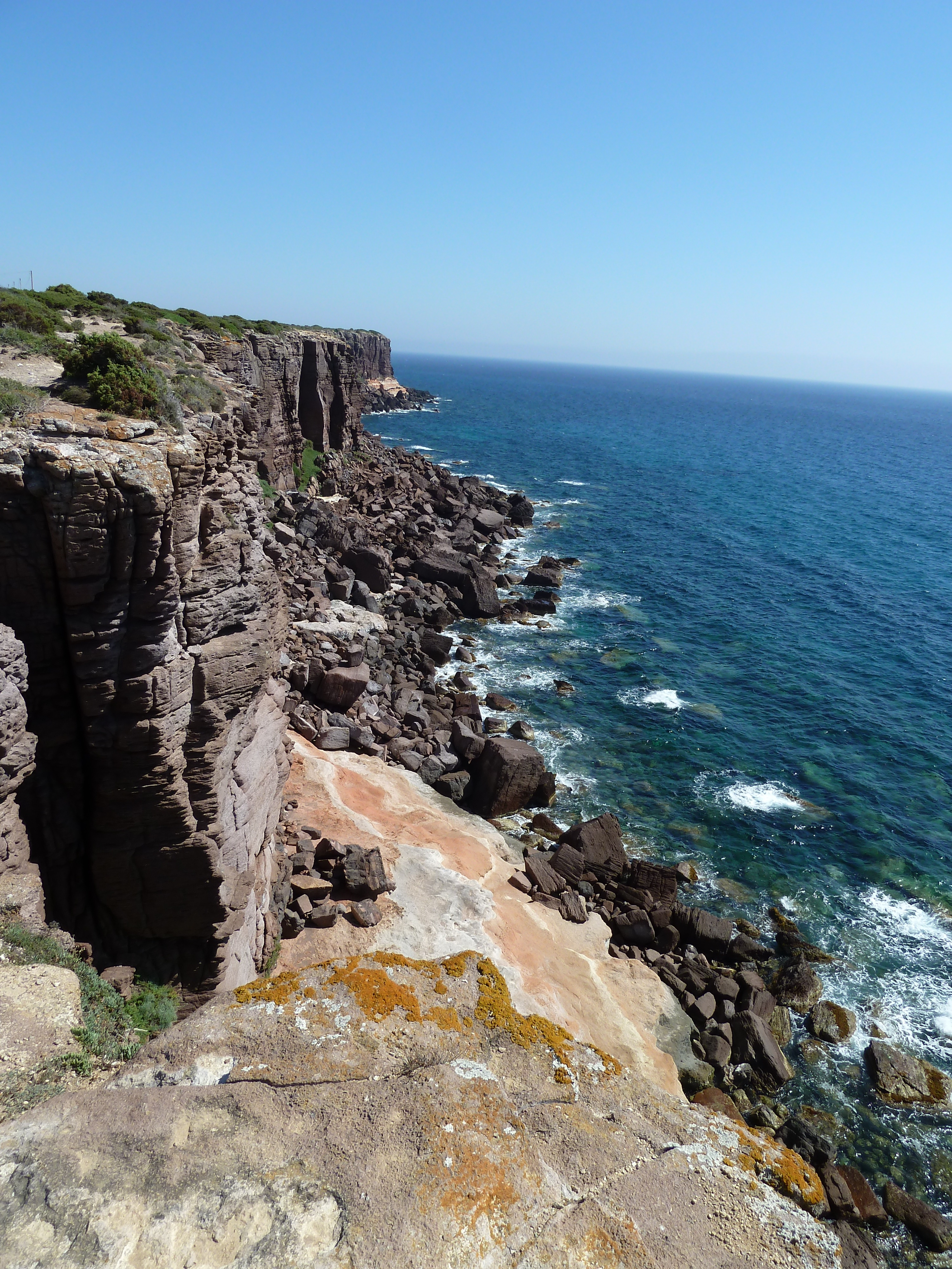 sant'antioco sardaigne